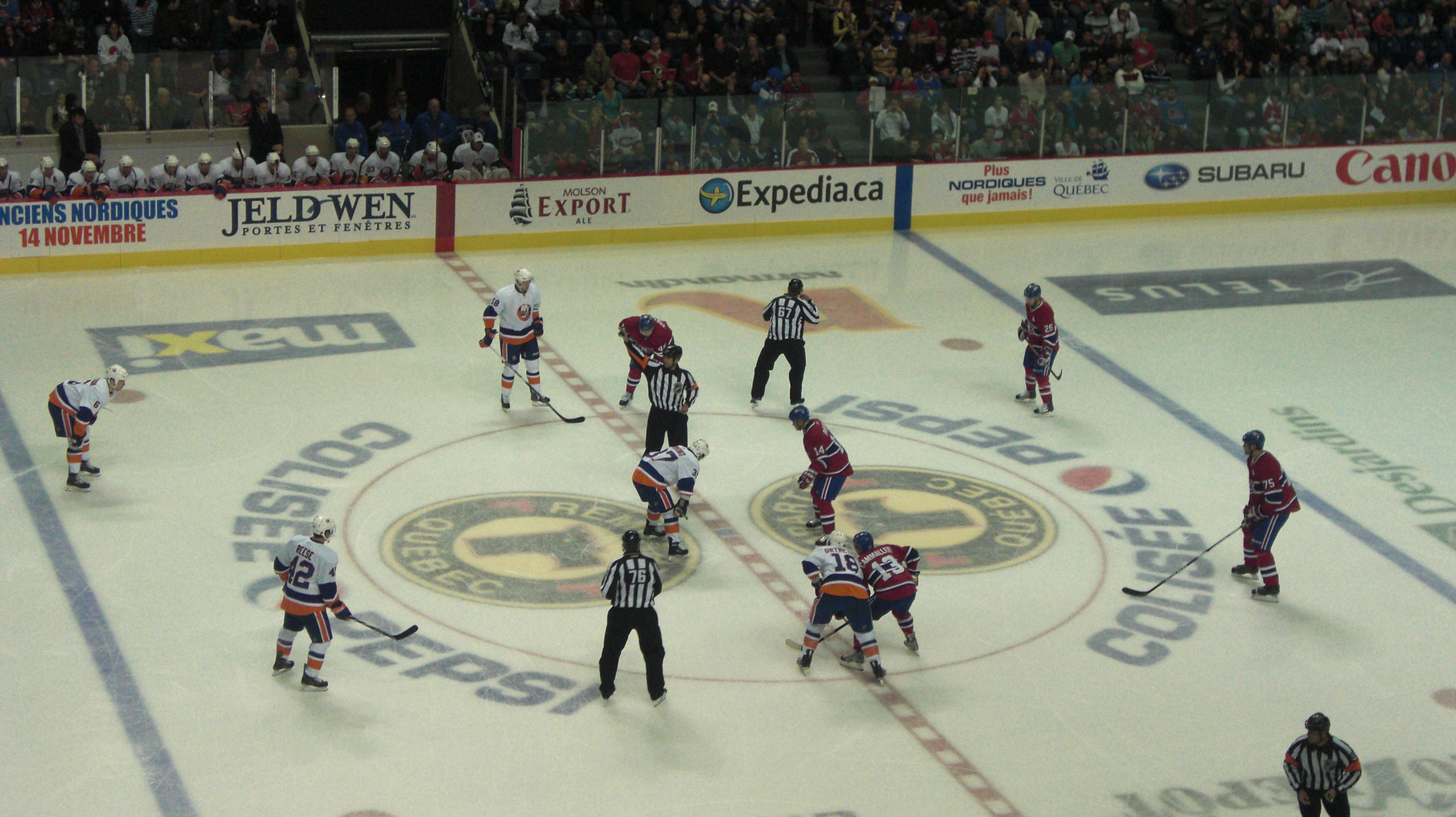 mise au jeu lors d'un match Montréal VS Islanders (2 octobre 2010 / saison 2010-2011)